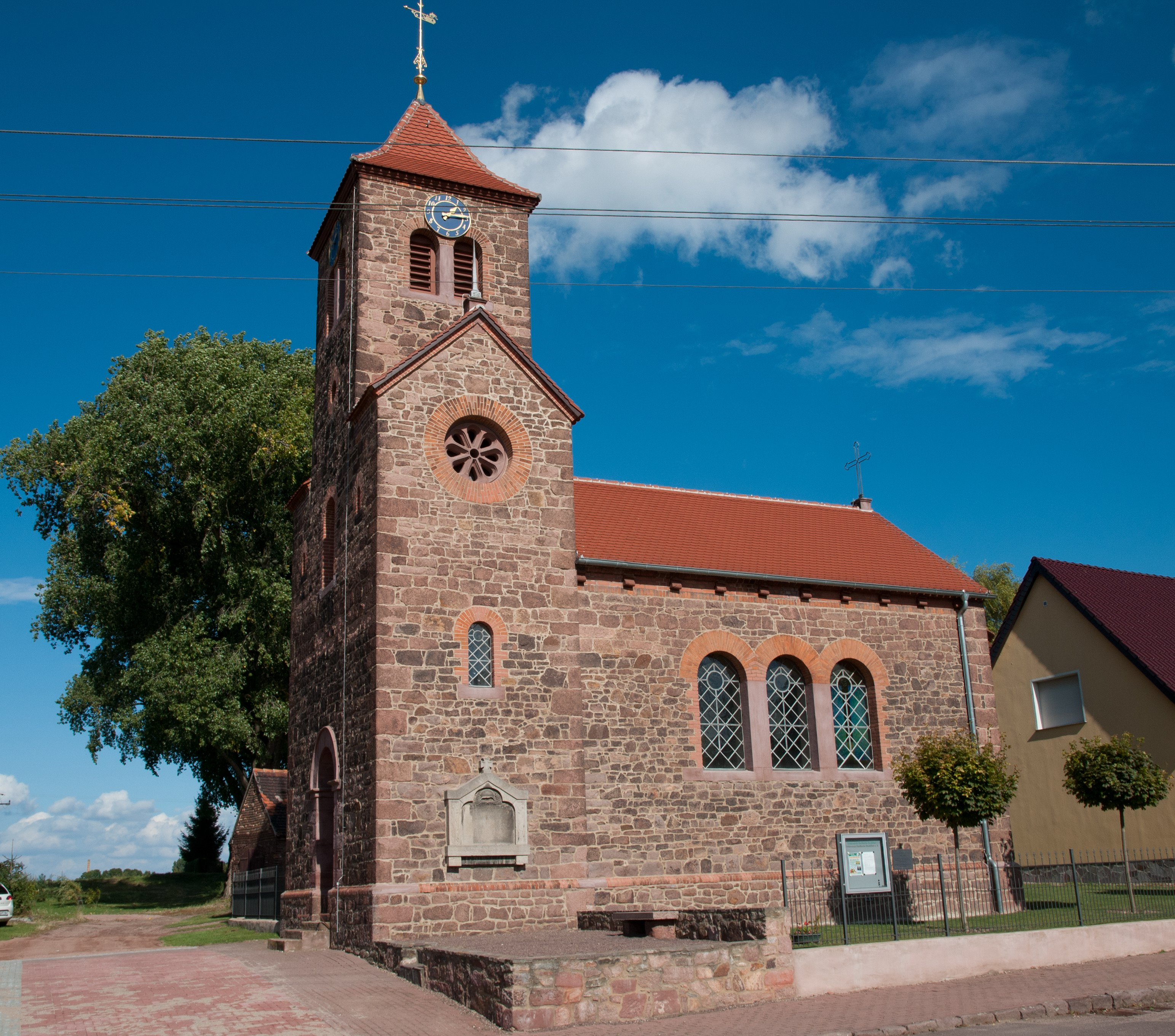 Deutleben Kirche (Sachsen Anhalt, Deutschland)